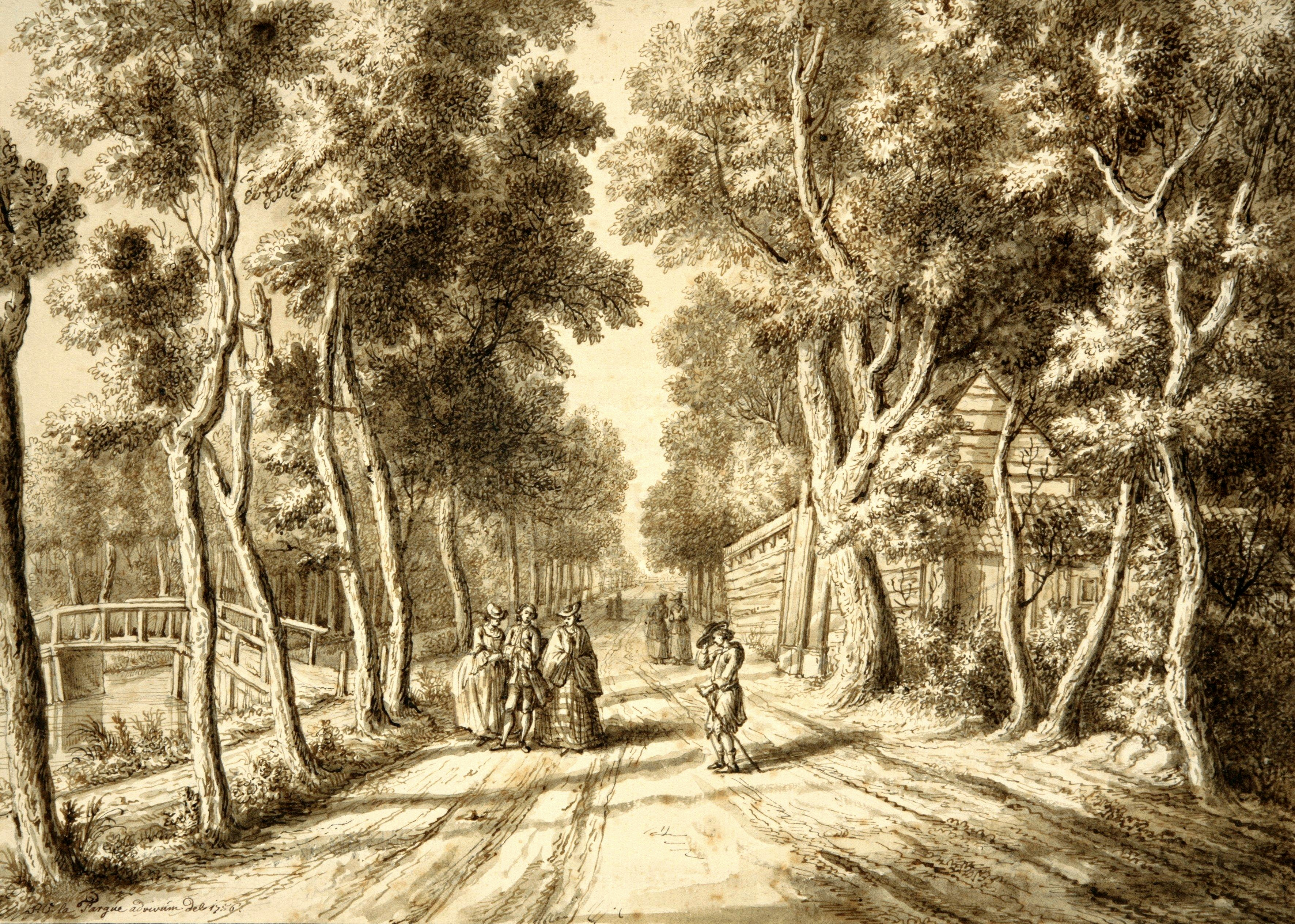 De Bezuidenhoutseweg gezien in de richting van Wassenaar, met links de Bezuidenhoutsevaart of Bossloot.